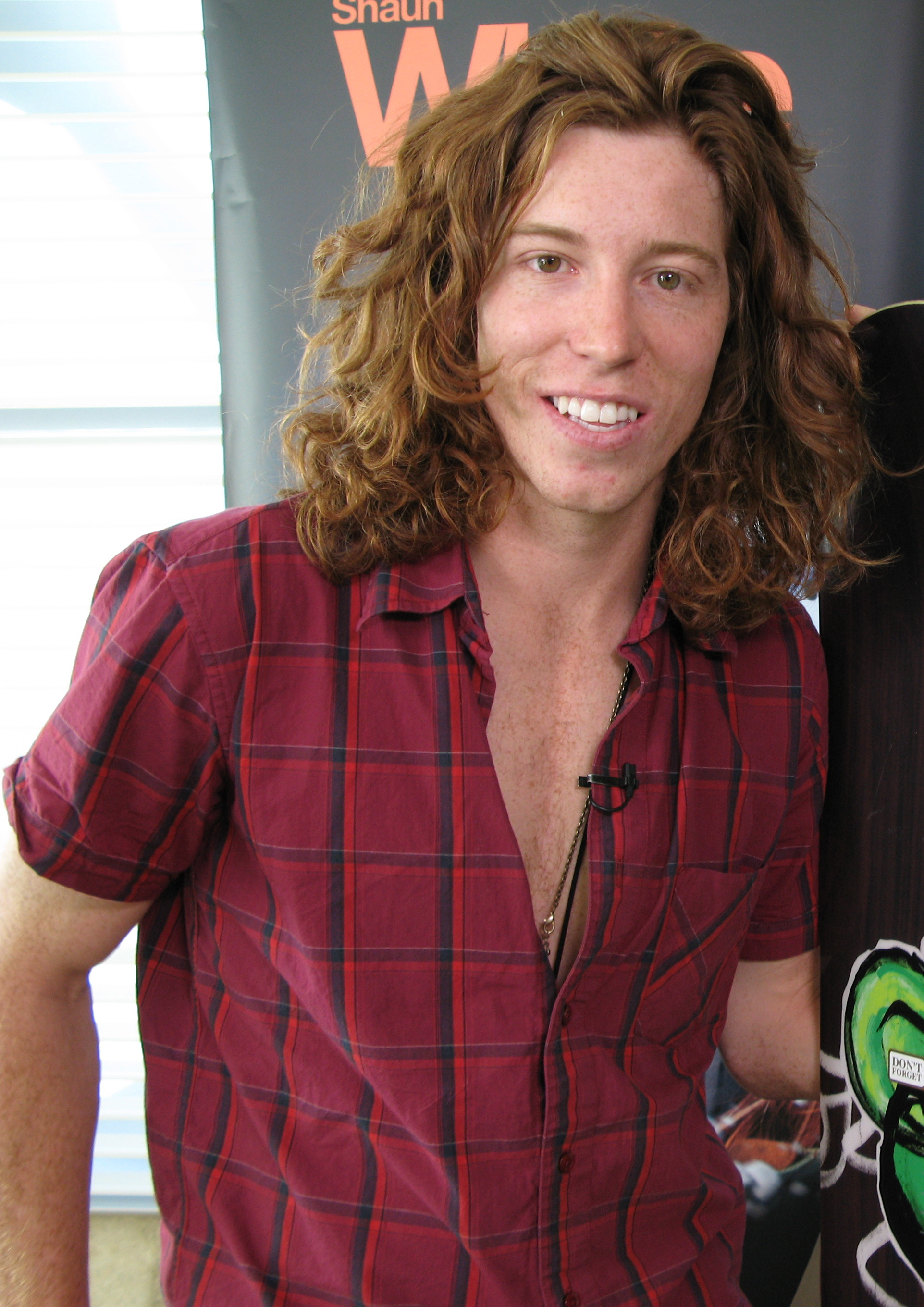 Shaun White in Utah (2008)